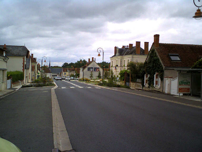 village du sud du Loir et Cher